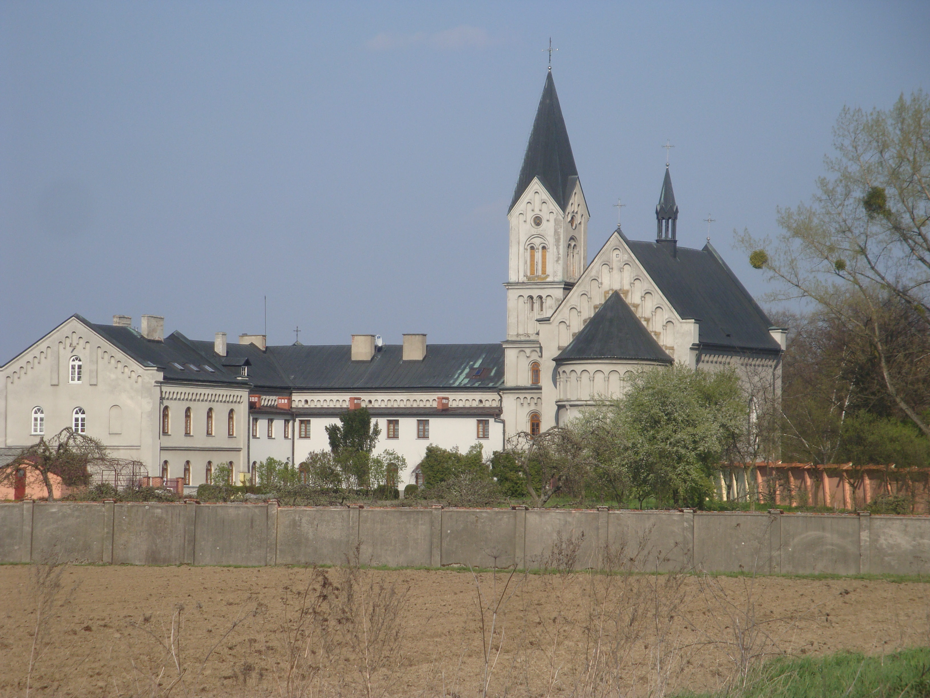 Klasztor dominikanek w Tarnobrzegu (Wielowsi) 04.1991.